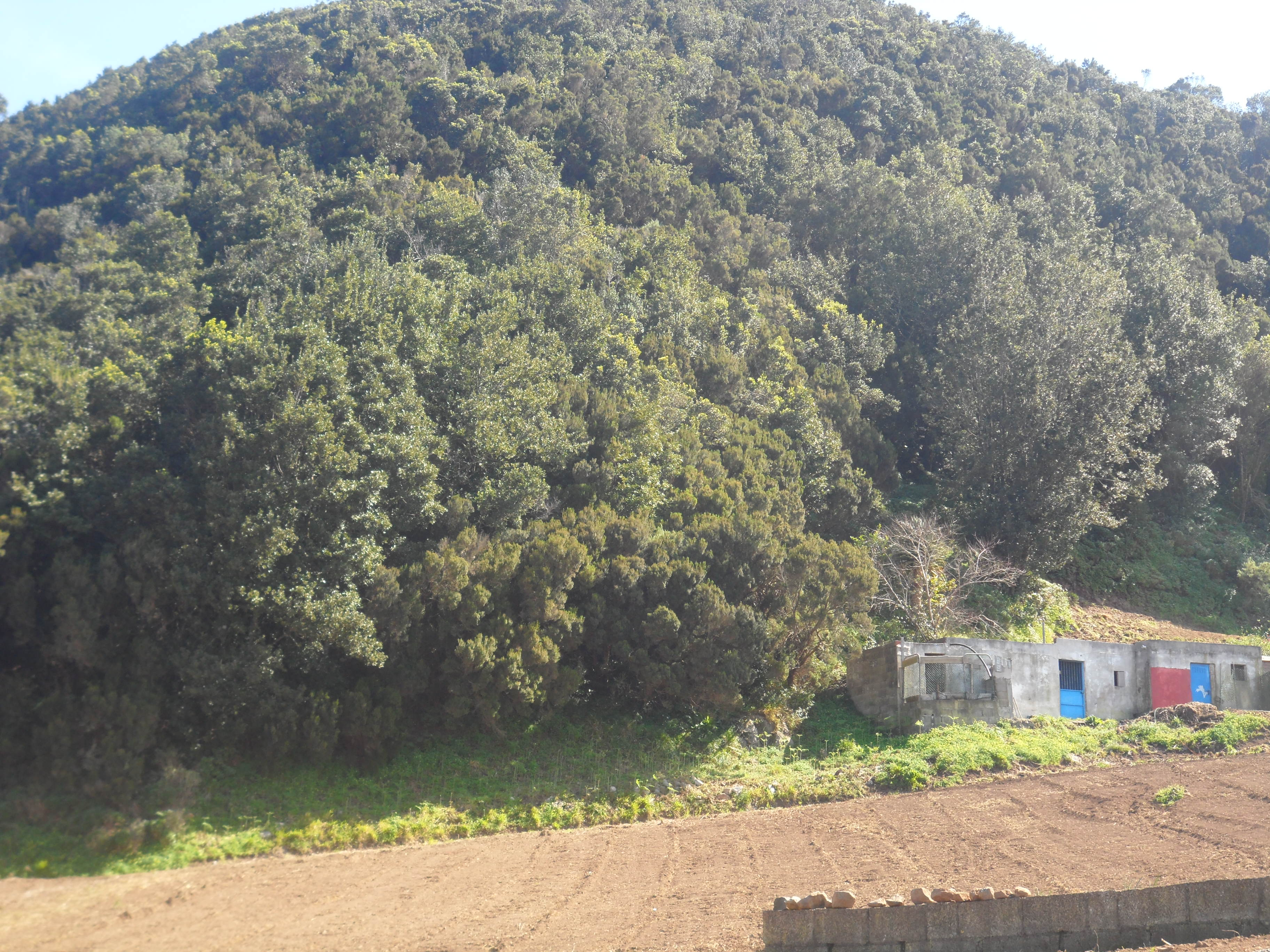 ̟Nombre por lo que deriva el caserío, por la forma superior de la montaña rocosa de forma redondeada sobre el que se asienta.